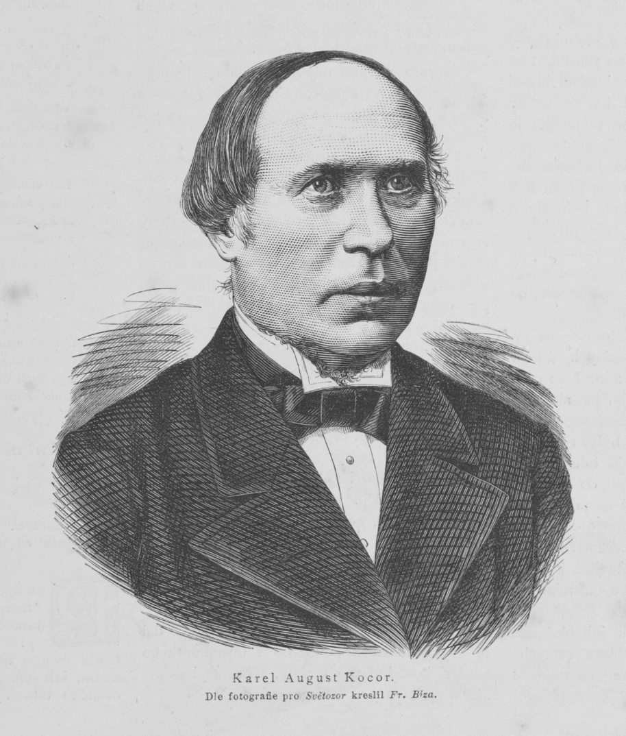 Hornjoserbsce: Portret Korle Awgusta Kocora (1822–1904), serbski komponist, dirigent a wučerserbski komponist, dirigent a wučer.